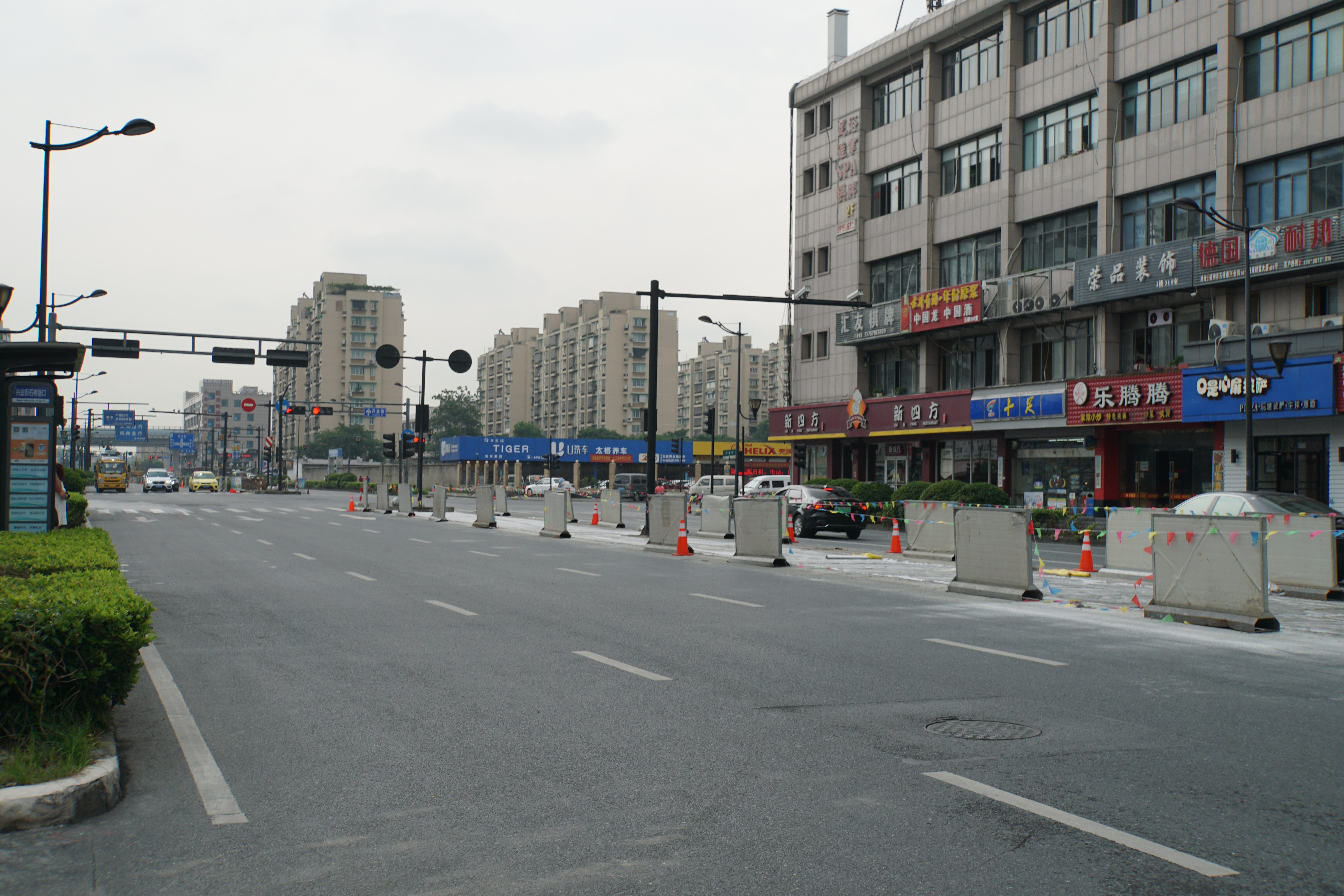 华中路站工地，2018年6月